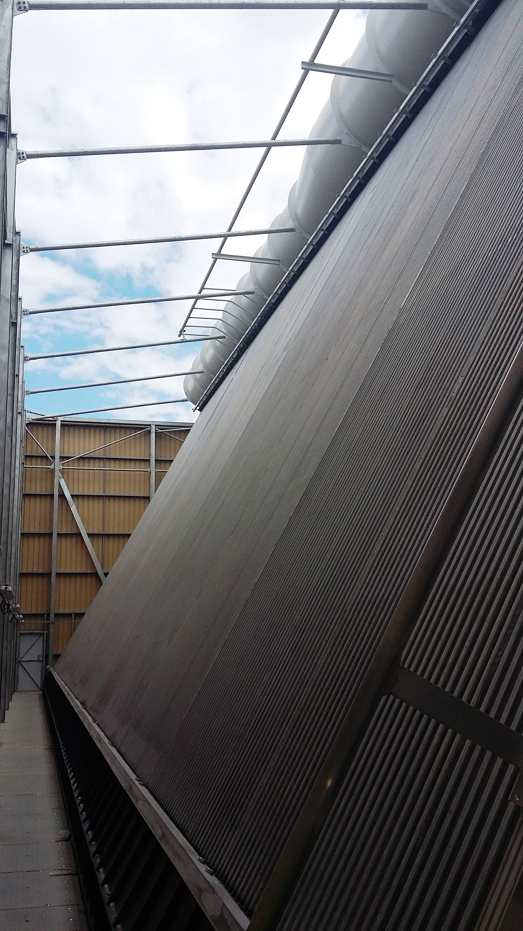 Les Aérocondenseurs sont formé de faisceau en tube rectangulaire parallèles, entre lesquelles on dispose des ailettes. Les faisceaux sont disposés en A. De gros ventilateurs à la base du A pousse l'air de manière verticale afin de refroidir les tubes et leur ailettes, par une circulation d'air frais de bas en haut. La vapeur en sortie de turbine arrive par une grosse canalisation au sommet du A, et circule dans les tubes rectangulaire, vers les bases du A. L'air frais circulant autour des tubes, permet de condenser la vapeur.